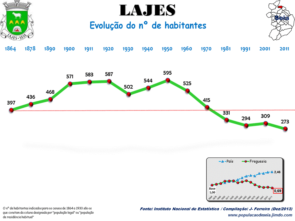 Evolução da População 1864 / 2011